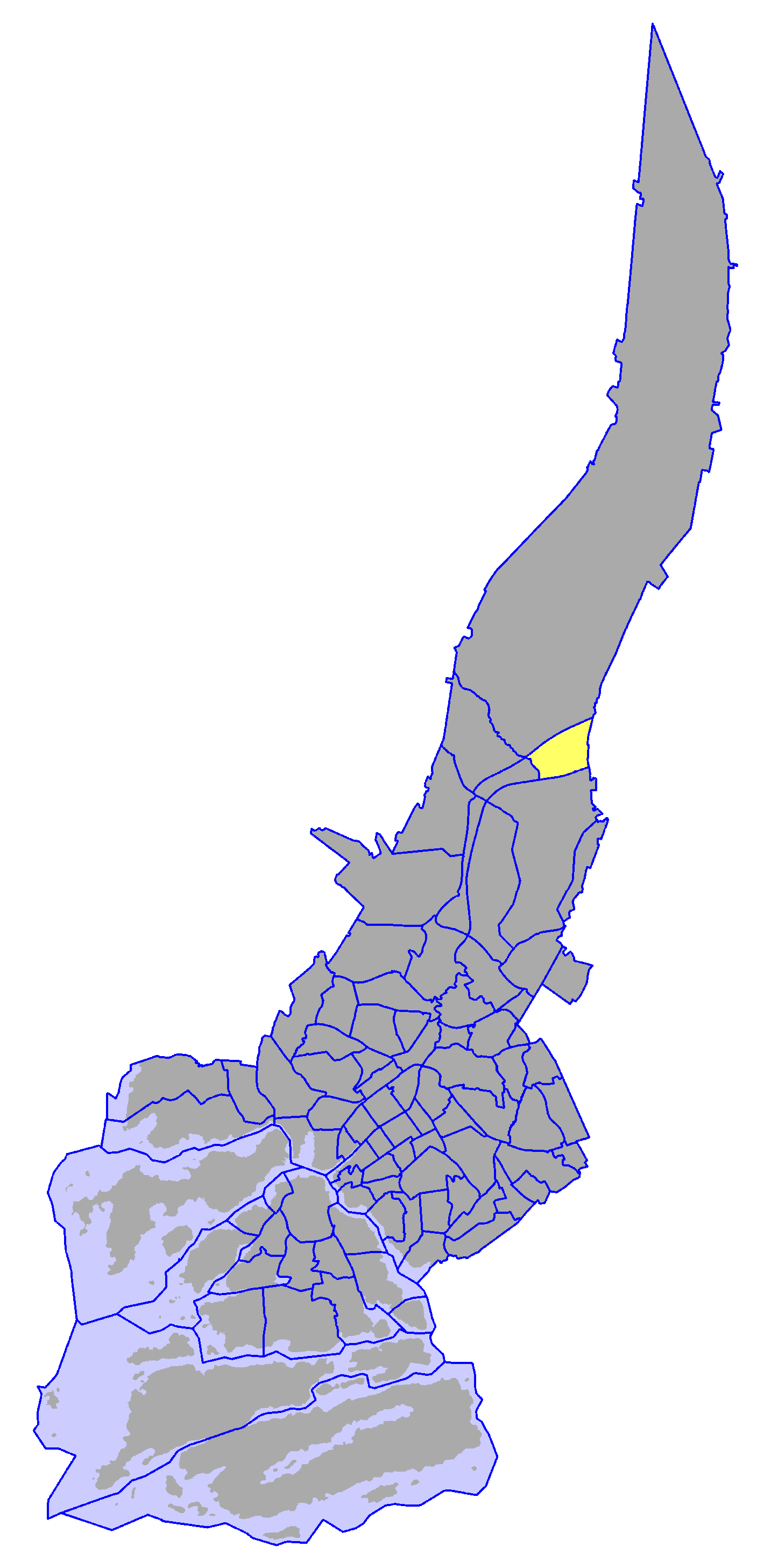 District of Jäkärlä, in Turku